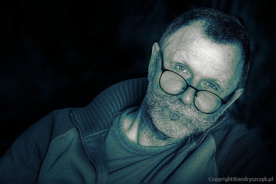 portret Adama Andryszczyka